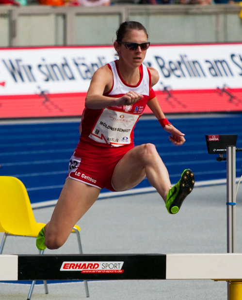 ISTAF Berlin 2012, 3000m Hindernislauf: Ancuta Bobocel, Docus Inzikuru, Antje Möldner-Schmidt